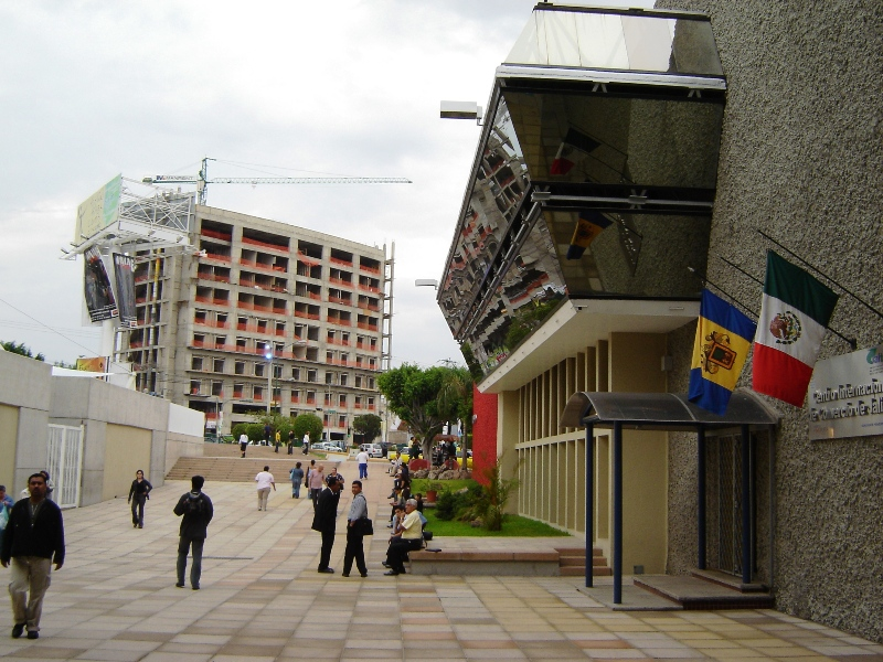 Expo Guadalajara y bandera de Guadalajara en oficinas de prensa taken with a SONY Camera model DSC-P73